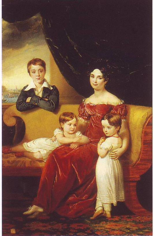 Нарышкина Мария Яковлевна с детьми Львом, Сергеем и Александрой (1823) Государственный Русский музей.